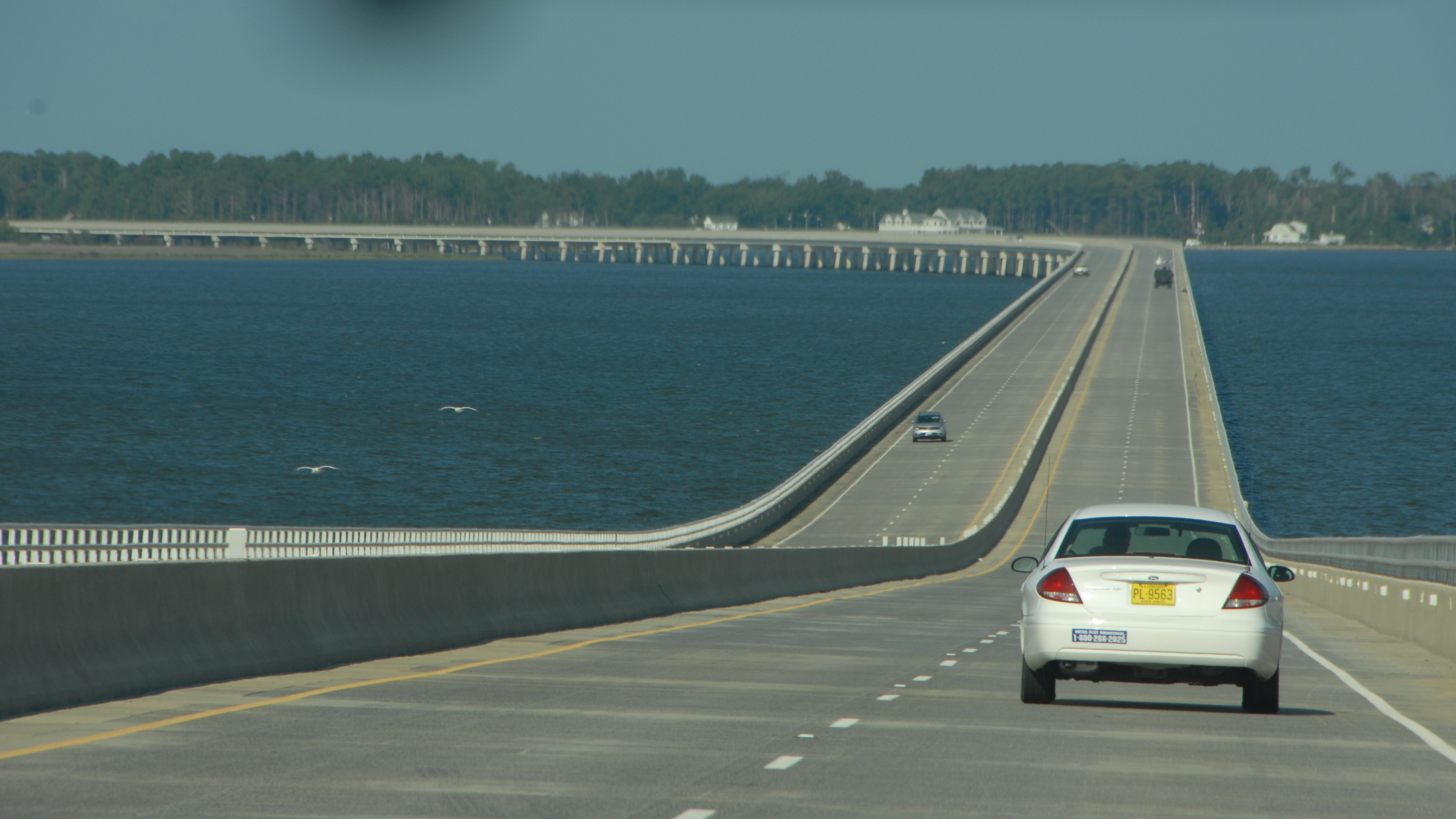 Outer BanksOuter Banks Virginia Dare Memorial Bridge